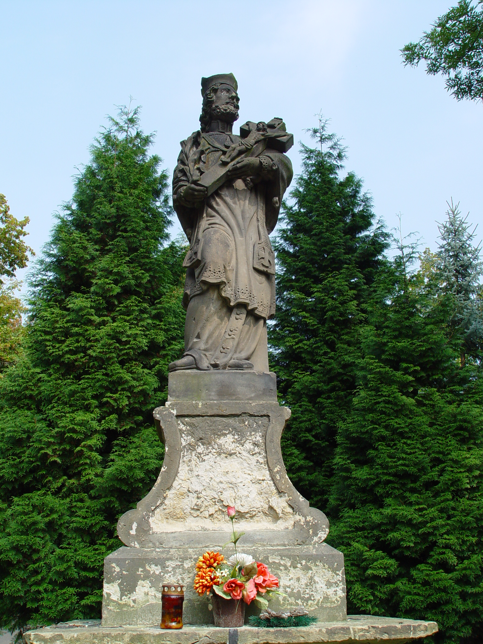 Socha sv. jana Nepomuckého na starém hřbitově v Mostě přenesená ze zrušené obce Židovice.